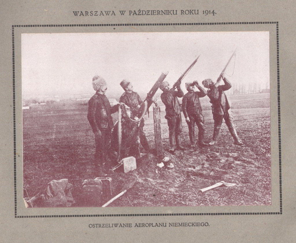 Rosjanie ostrzeliwują niemiecki samolot nad Warszawą. Październik 1914.